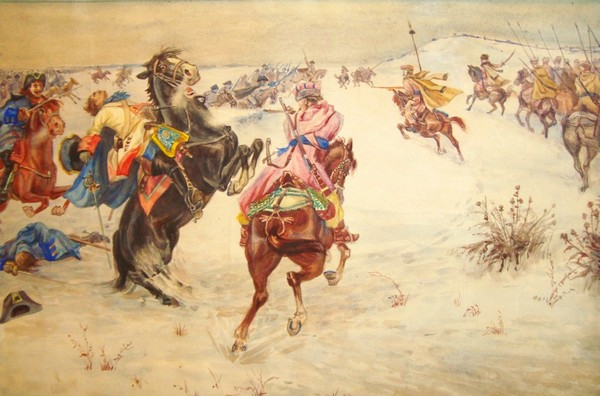 Бій козаків Харківського полку зі шведами під Веприком.